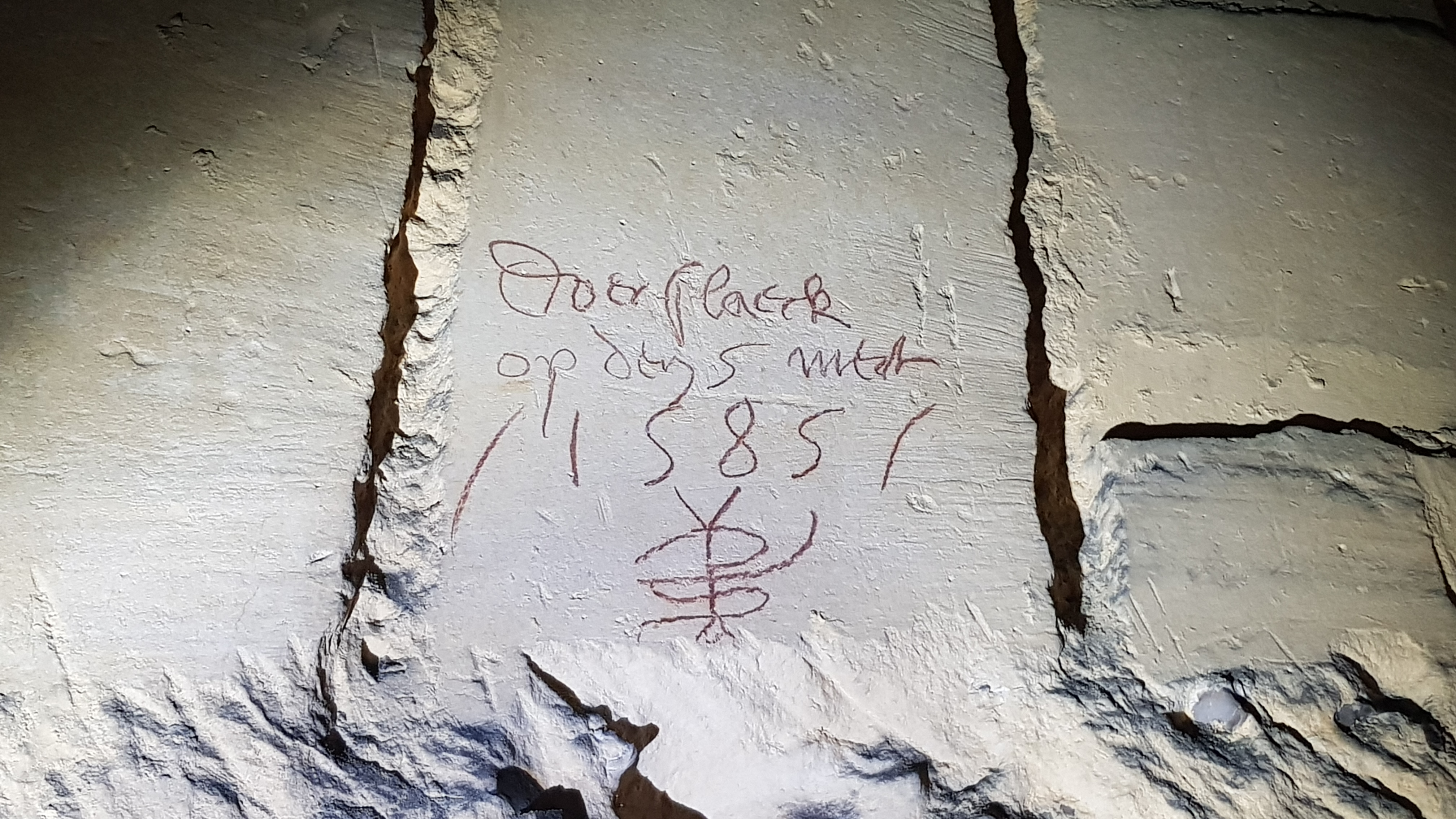 Gangenstelsel Zonneberg in de Sint-Pietersberg, Maastricht, Nederland